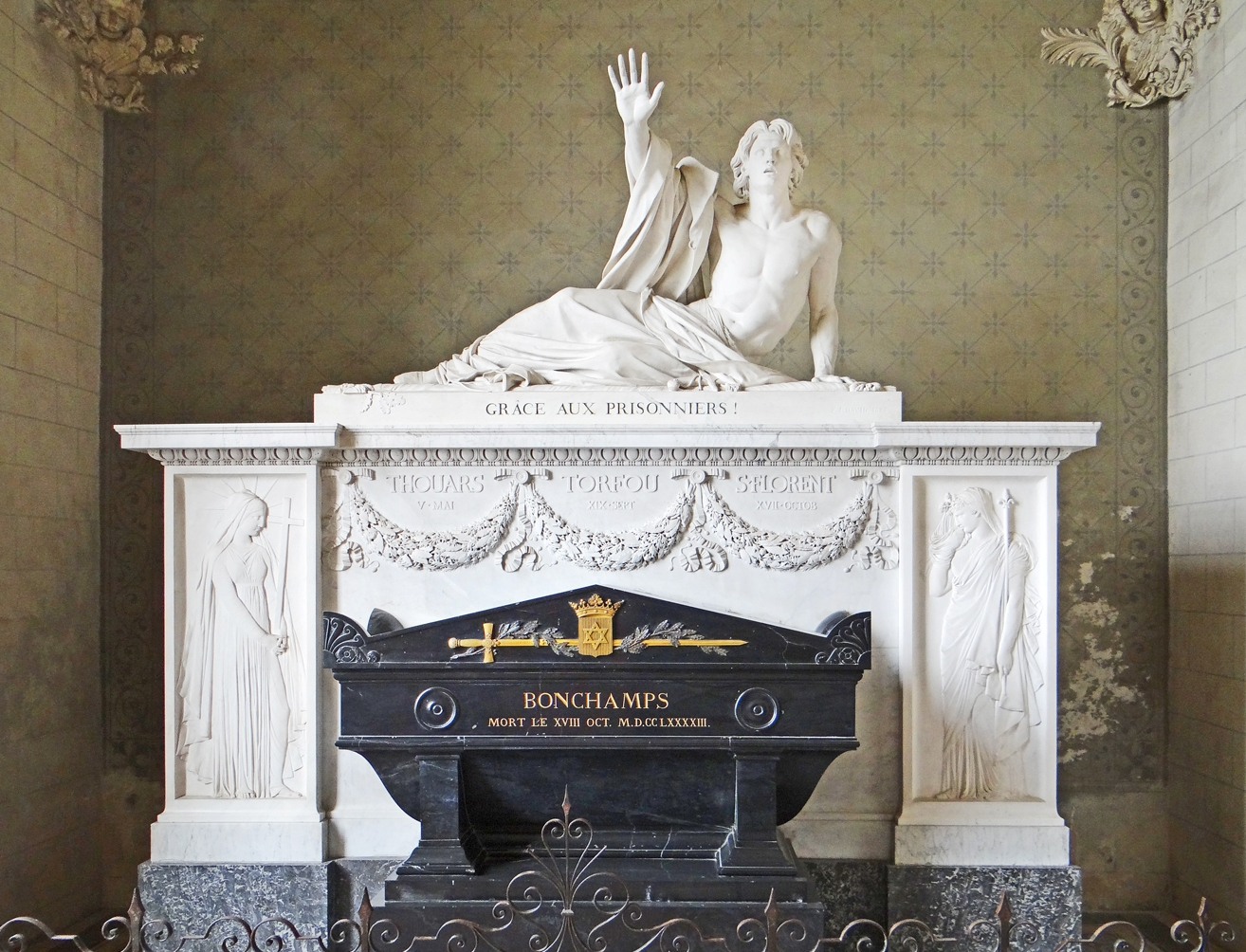 Le tombeau de Charles de Bonchamps (1760-1793), général du soulèvement vendéen, sculpté par David d'Angers (1788- 1856) dont le père avait été gracié par C. de Bonchamps lors des guerres de Vendée. Le général est représenté blessé à mort ordonnant le18 octobre 1793, la grâce des prisonniers républicains. Article de Wikipedia sur Bonchamps Autre oeuvre de David d'Angers (photo dalbera)